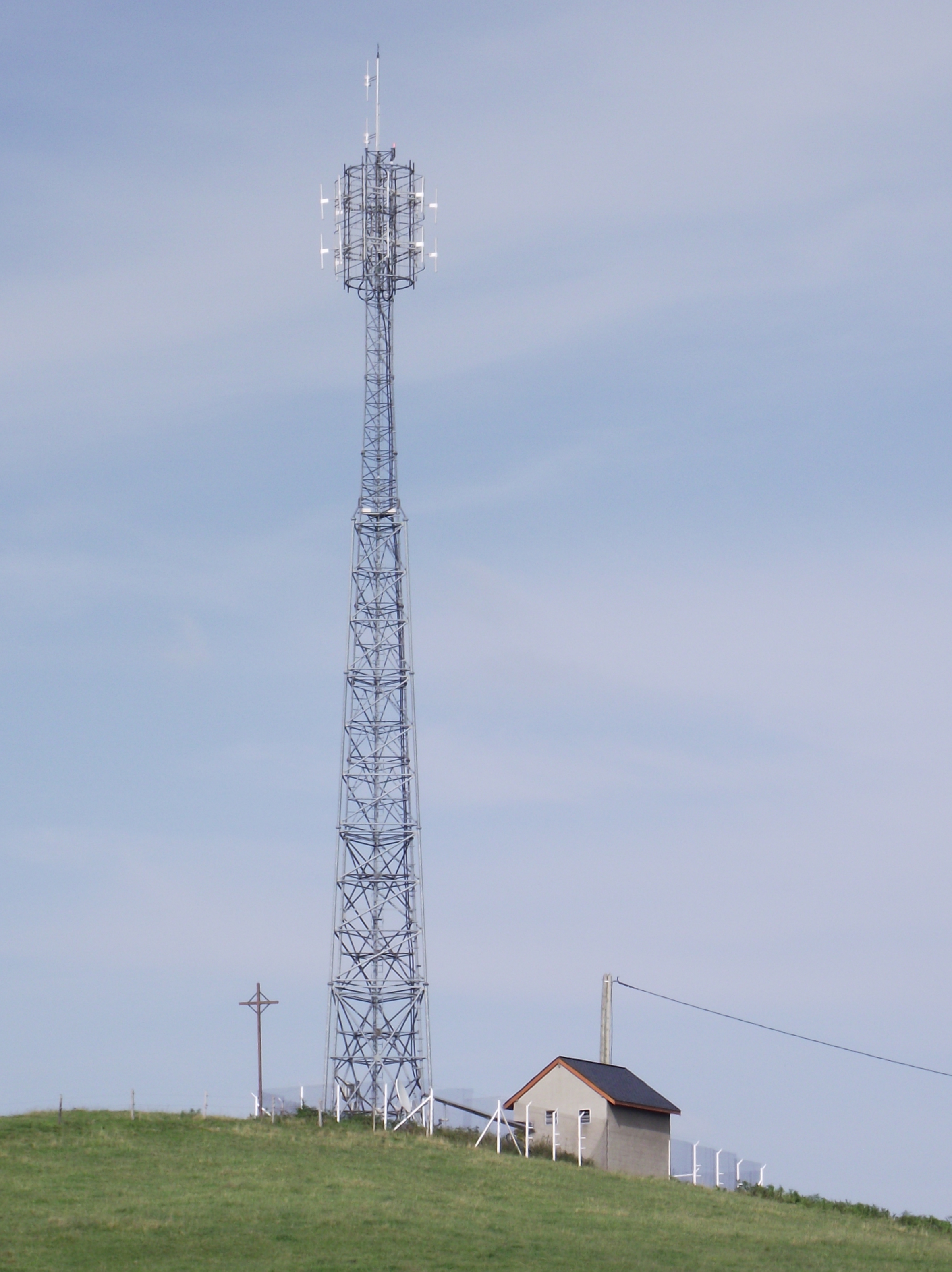 Colline de Miramont, Hautes-Pyrénées, France